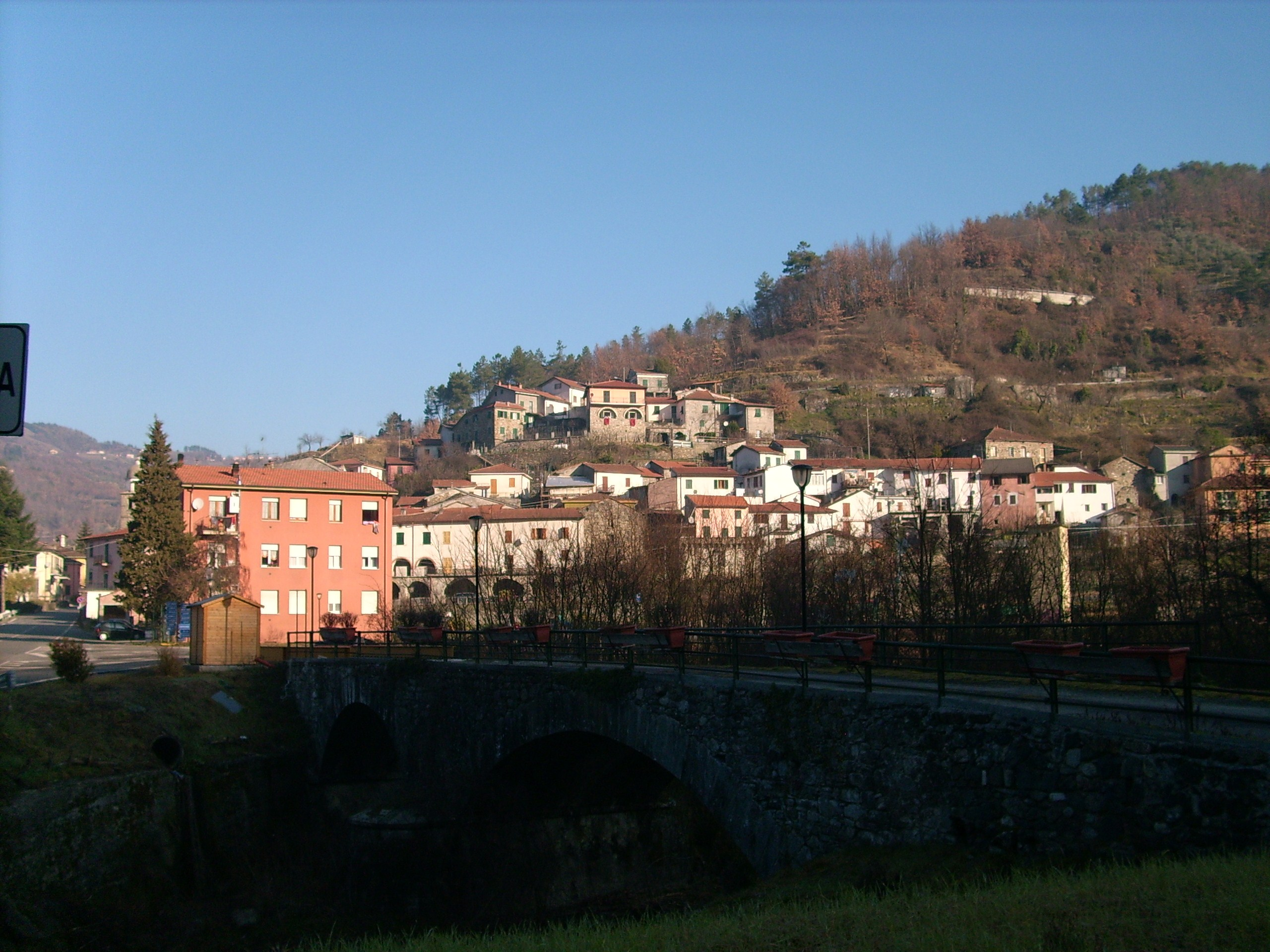 Panorama di Rocchetta di Vara, Liguria, Italy